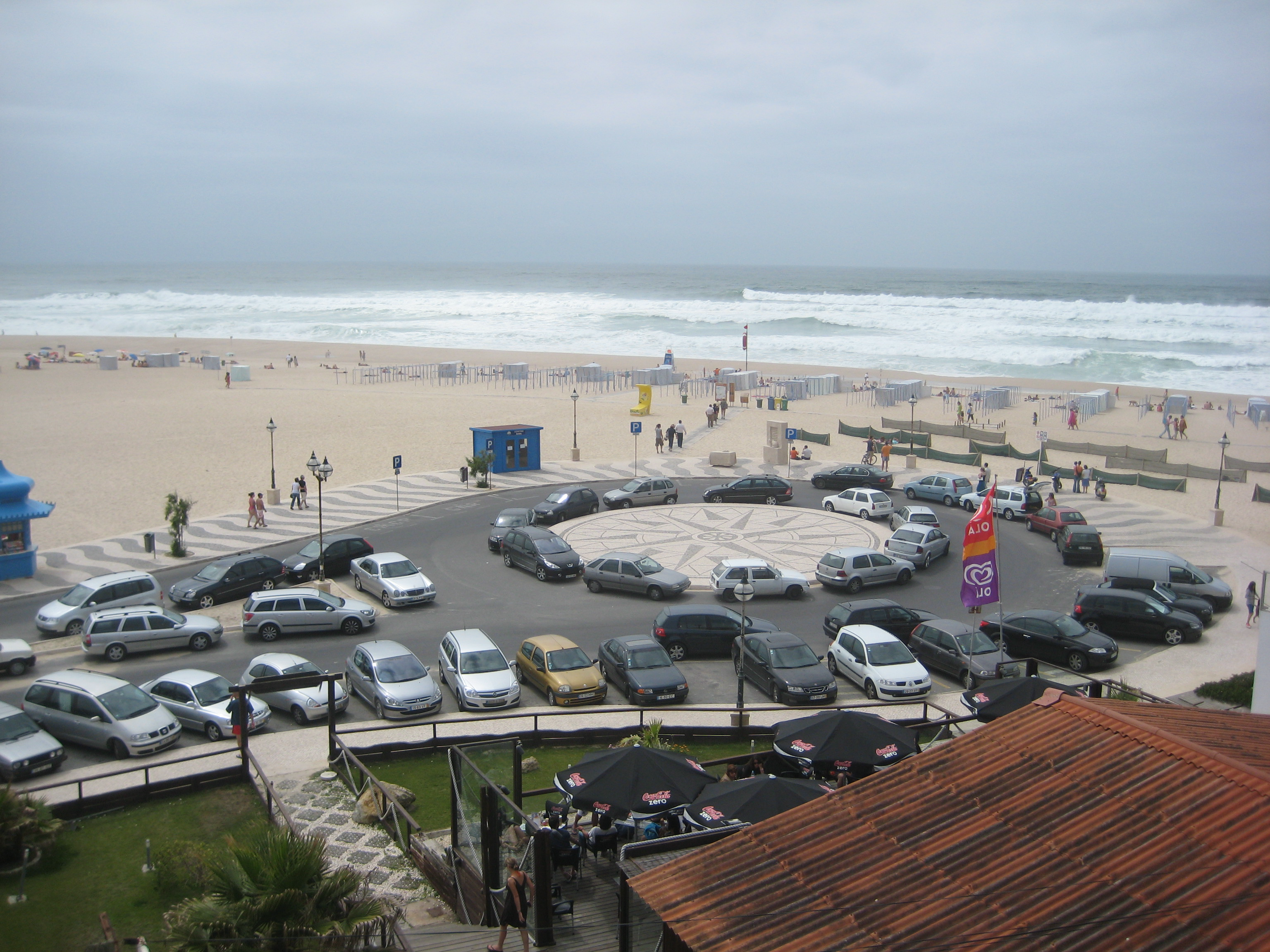 Foz do Arelho, Caldas da Rainha